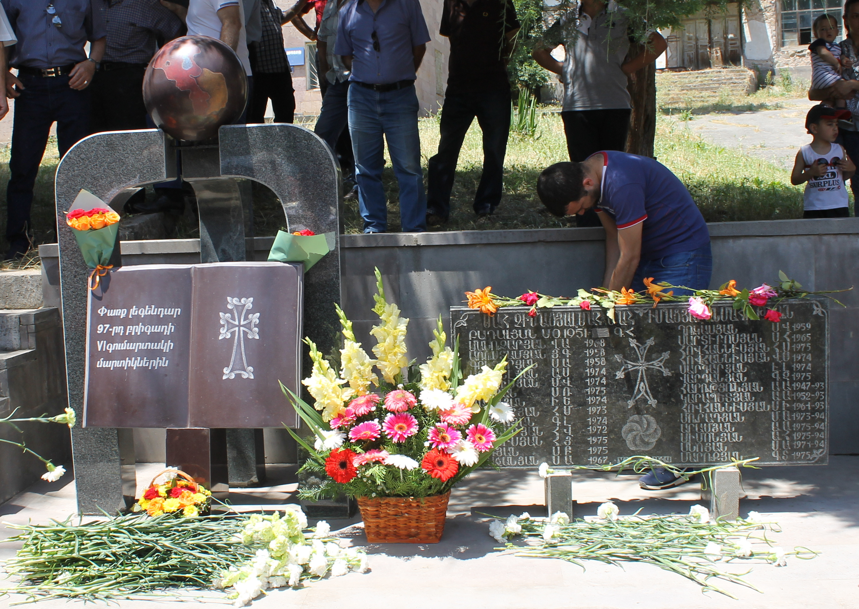 Հուշակոթող՝ նվիրված Կապանի 97-րդ բրիգադի 6-րդ մոտոհրաձգային գումարտակի անհետ կորած տղաների հիշատակին